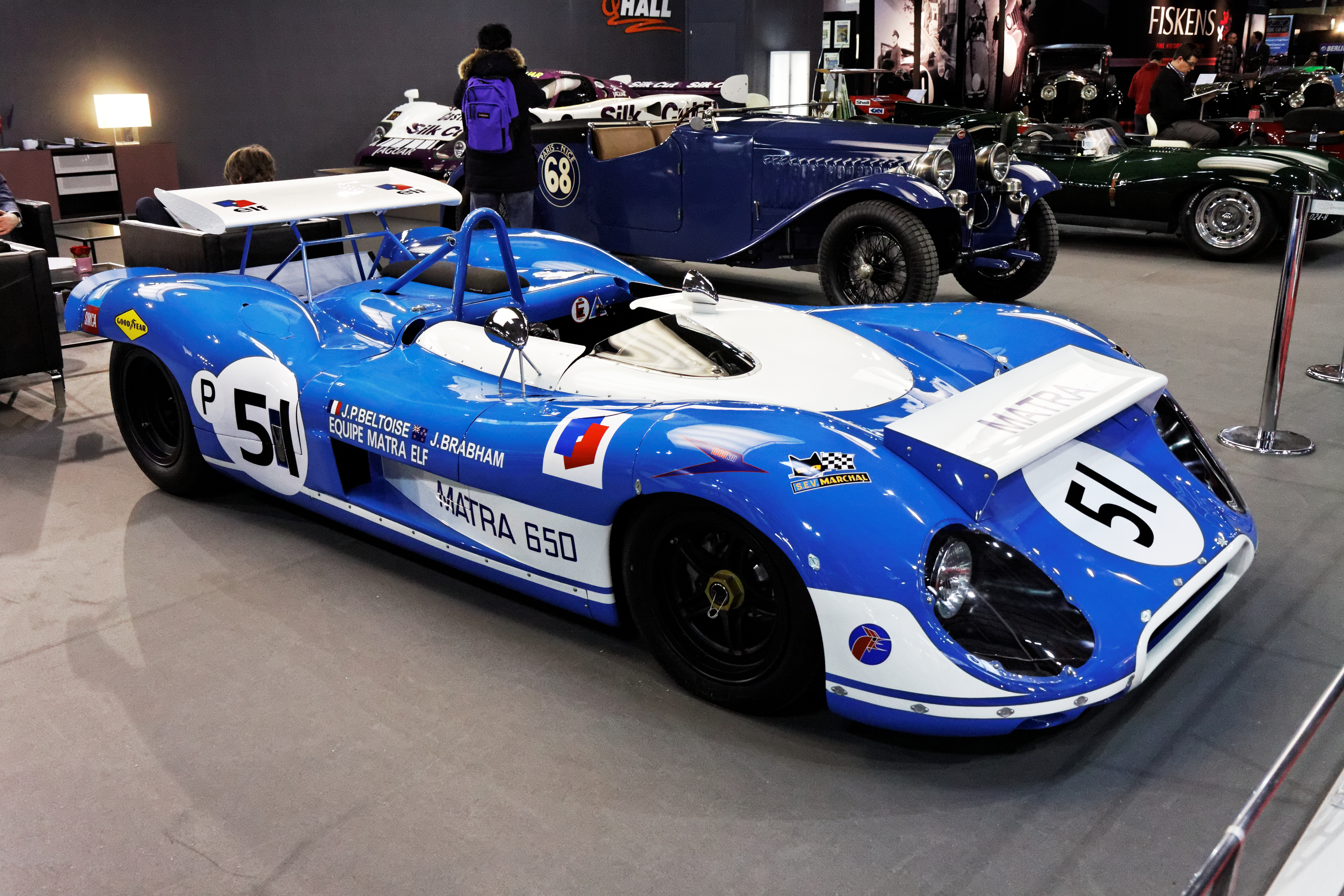 Une Matra MS 650 présentée lors du salon Retromobile 2013.